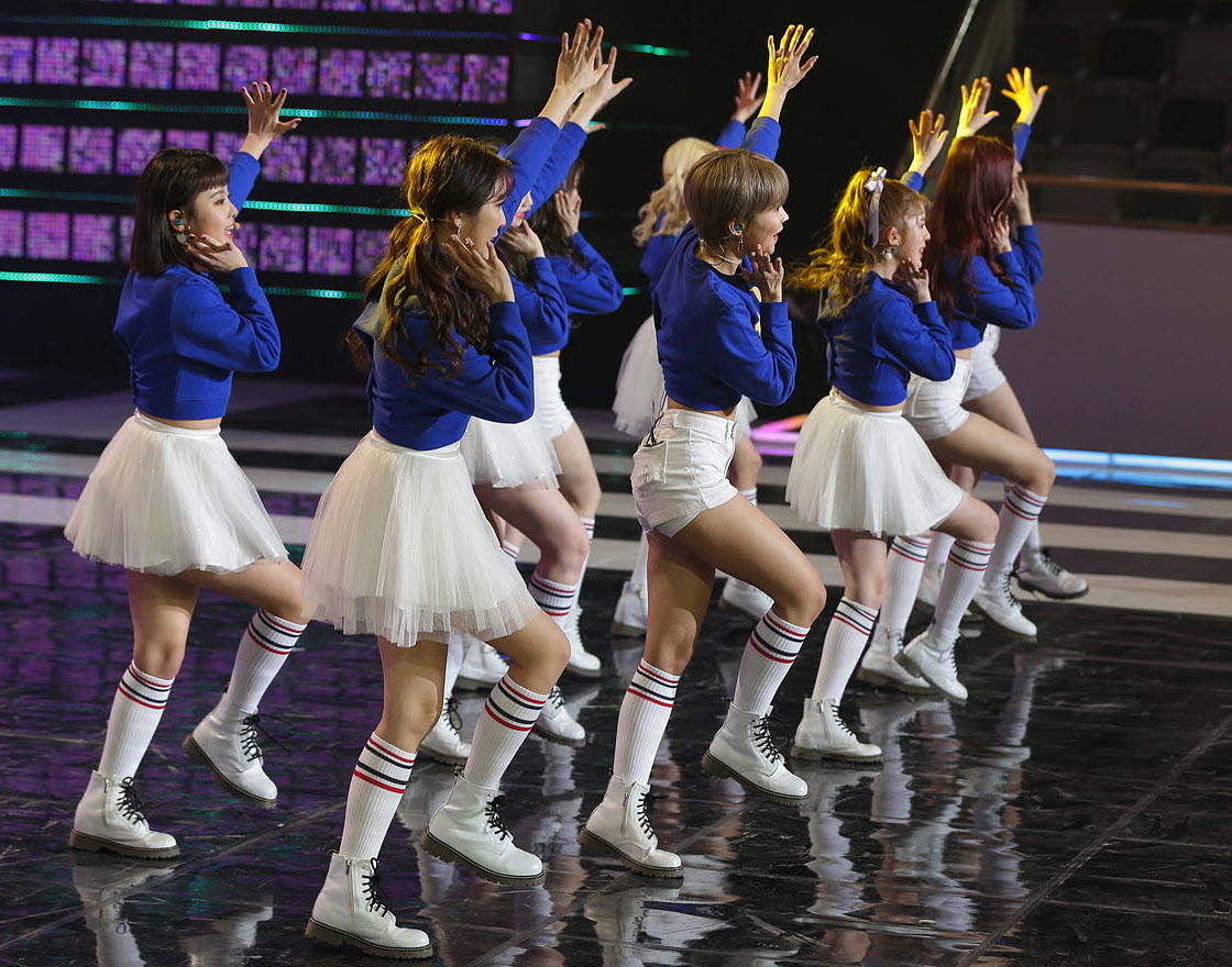 모모랜드(MOMOLAND) 평창 동계올림픽 G-10 특집 생방송